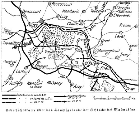 Übersichtskarte über das Kampfgelände